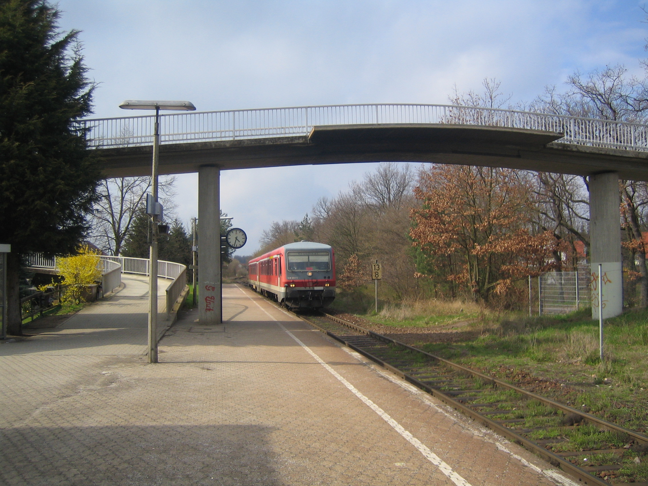 Hp. Huttenheim, selbst fotografiert